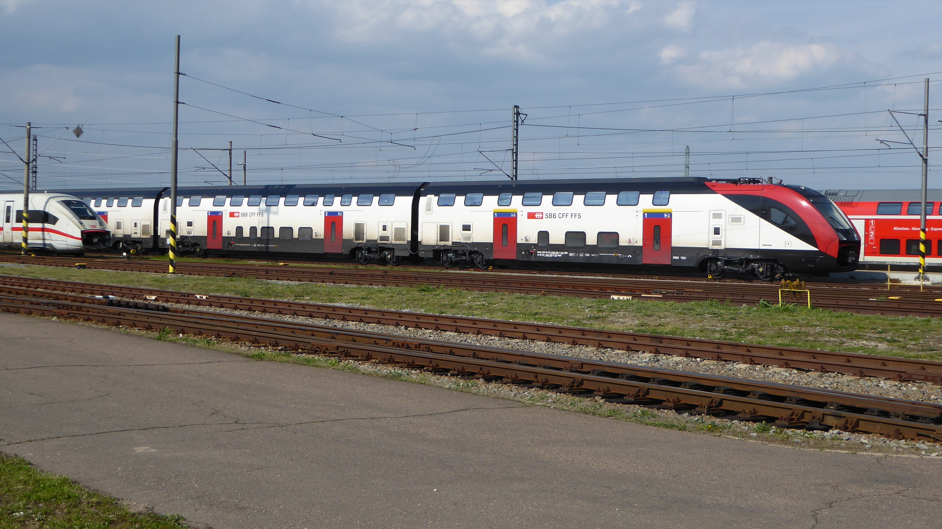 Twindexx Swiss Express SBB RABe 502 400 auf dem Eisenbahnversuchsring Velim (CZ)